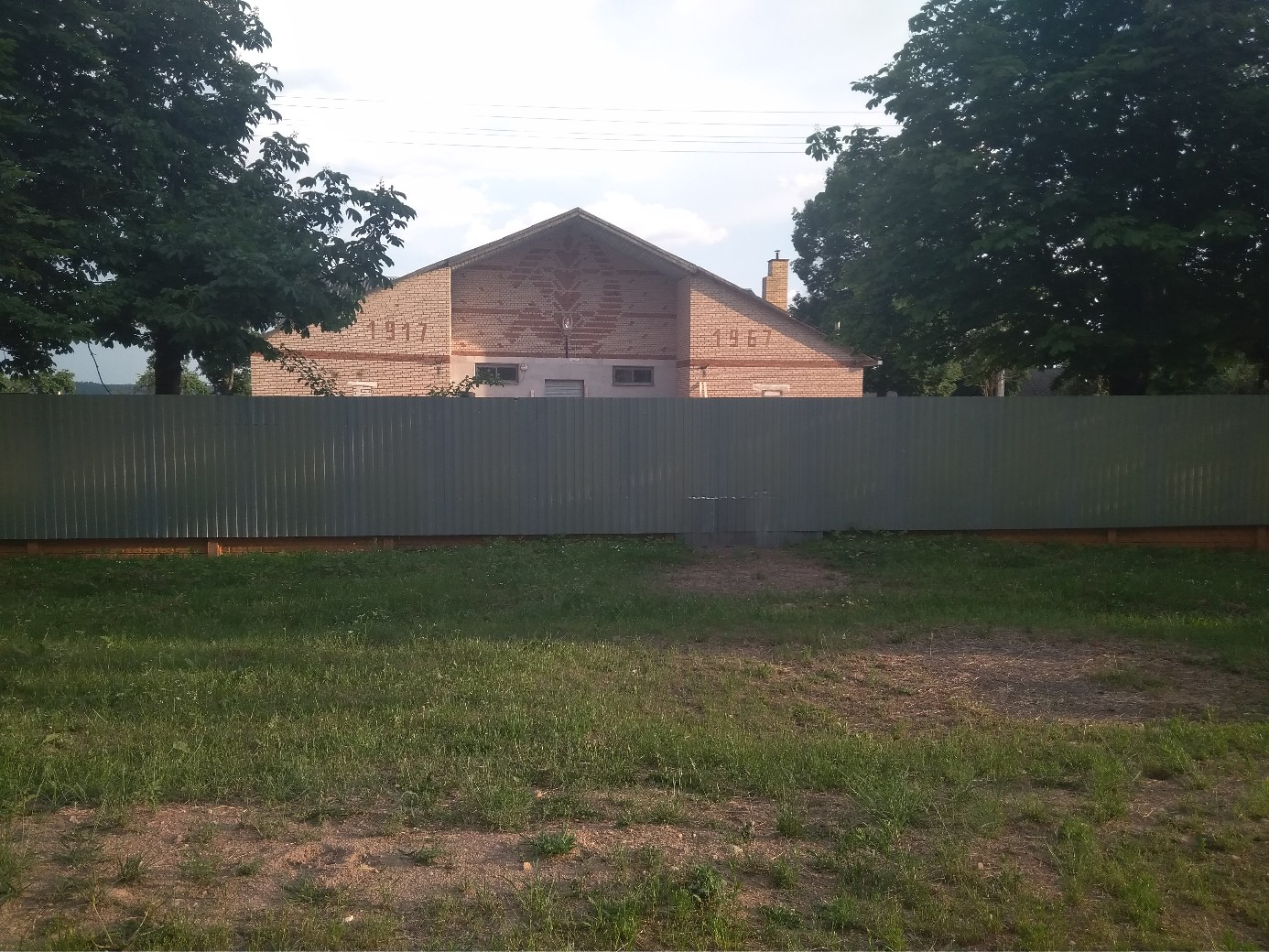 Бывшее здание сельсовета в д. Старинки